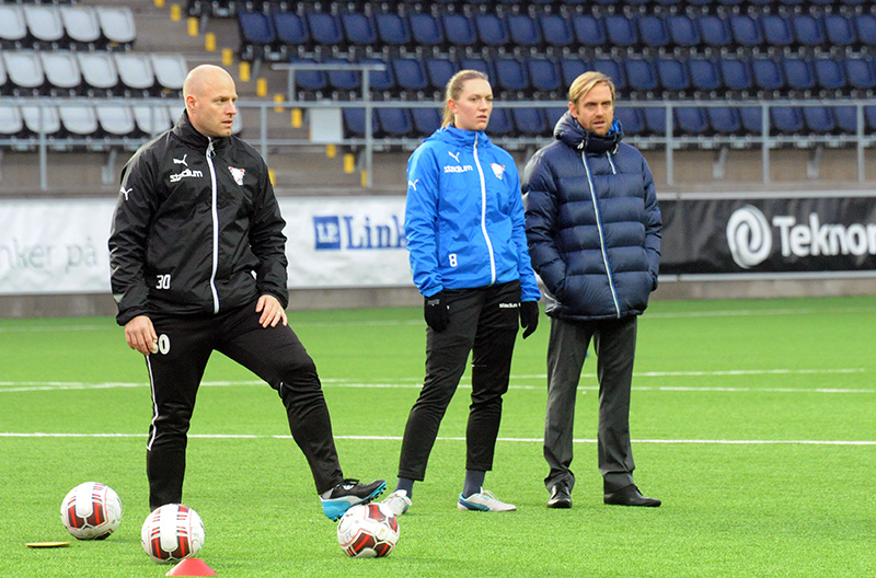 (R-L): Anders Jacobson, Jennie Nordin, Martin Sjögren